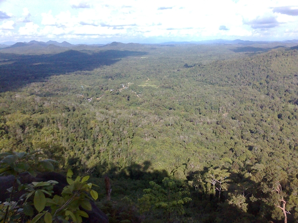 ini adalah desa selantak dan simpang dua dari Bukit Bakah